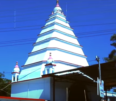 হিন্দু মন্দির